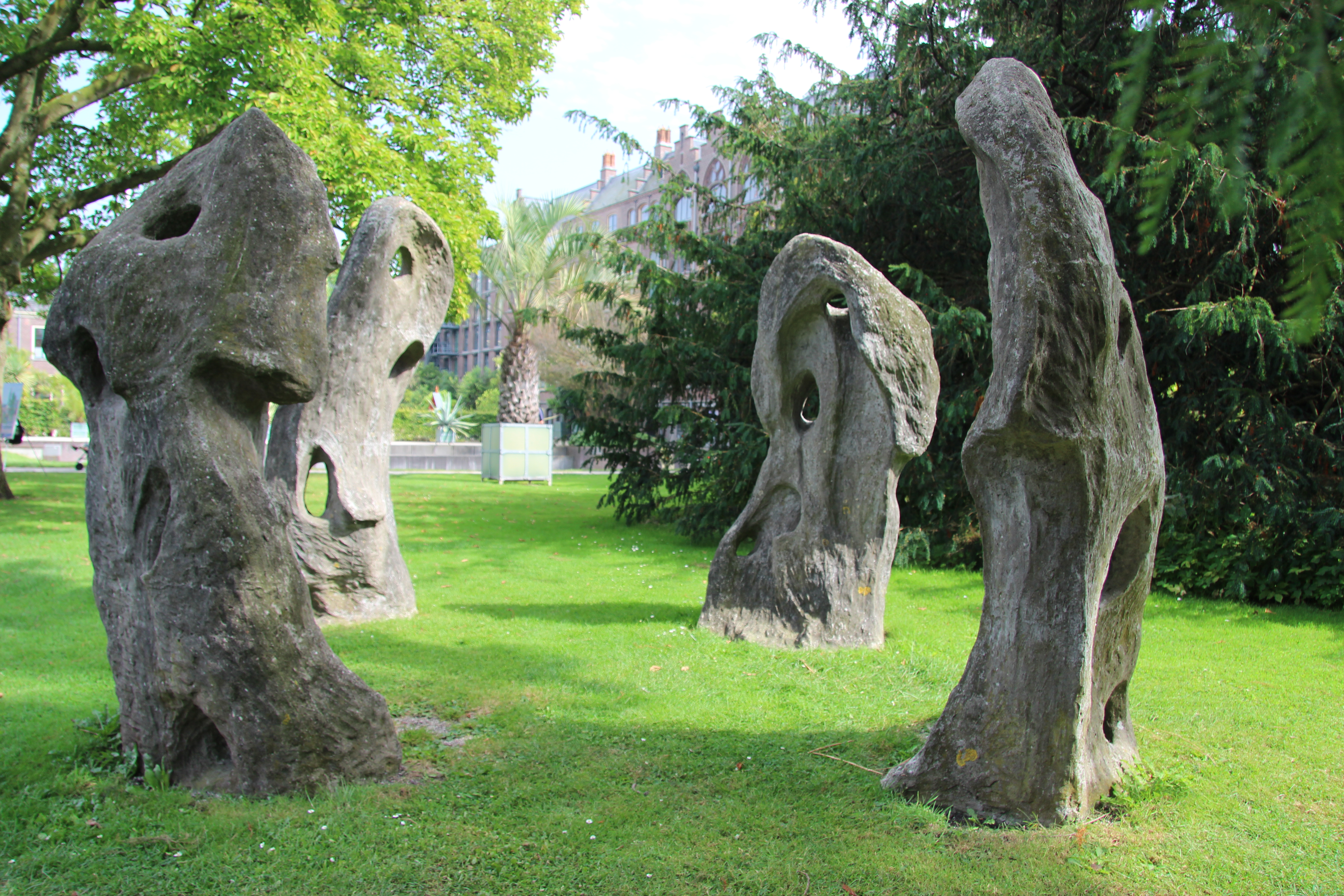 Beeldengroep in Hortus Leiden De beeldengroep De Vier Eeuwen is gemaakt door beeldhouwster Ans van Haersolte-Dijk (1911-1991) ter gelegenheid van het honderdjarig bestaan van 'Vrolec', de 'Vereniging van echtgenoten en partners van hoogleraren aan de Universiteit Leiden'. De toen nog 'Vereniging van echtgenoten van hoogleraren en lectoren der Rijksuniversiteit Leiden' schonk de beeldengroep in 1975 aan de Leidse Universiteit ter gelegenheid van het vierde eeuwfeest van de Leidse Universiteit.